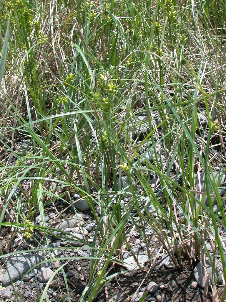 2005/05/08 和歌山県御坊市：Gobo City. Wakayama Pref. Japan